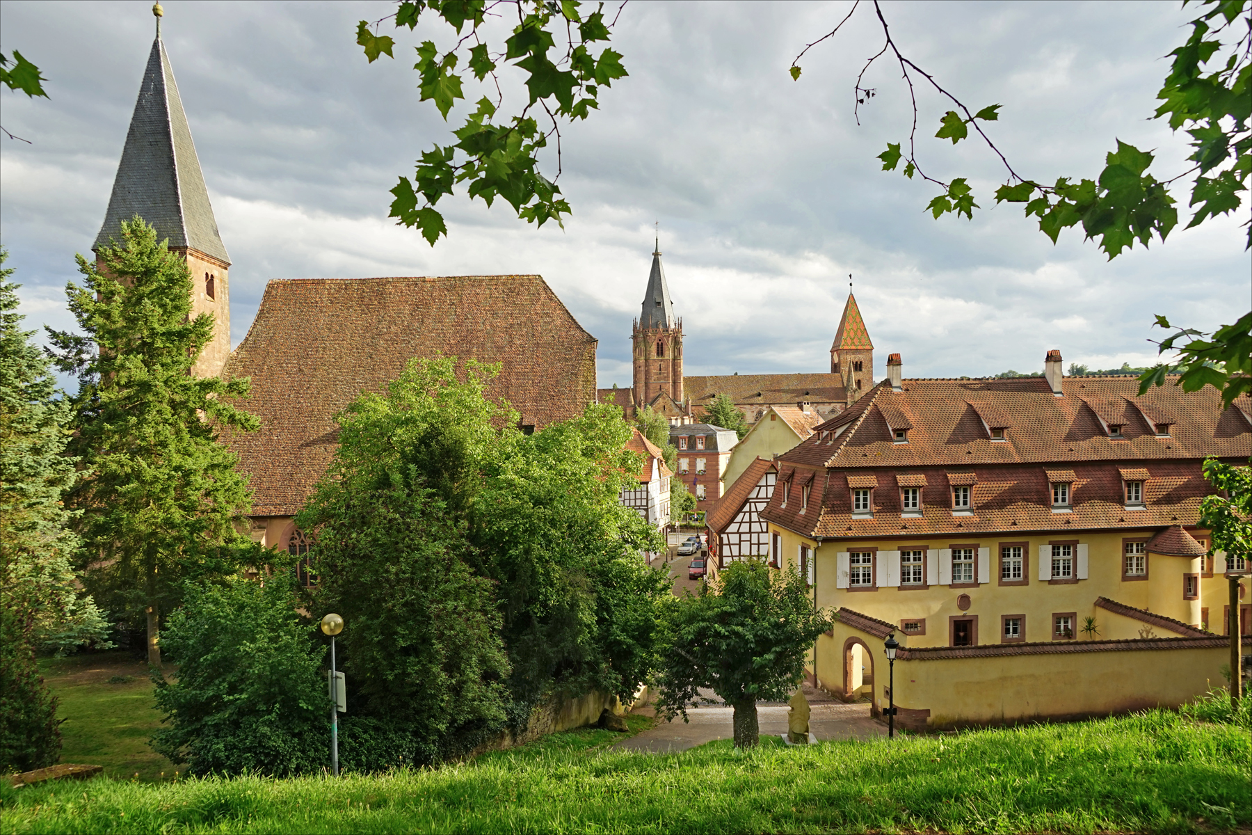 Au premier plan, les anciens remparts de la ville. au deuxième plan, à gauche, la paroisse protestante Saint Jean (clocher roman du XIIIè siècle) Au fond, l'abbatiale catholique Saint Pierre et Saint Paul et ses deux clochers roman (XIè siècle) et gothique (XIIIè - XVIè siècle).